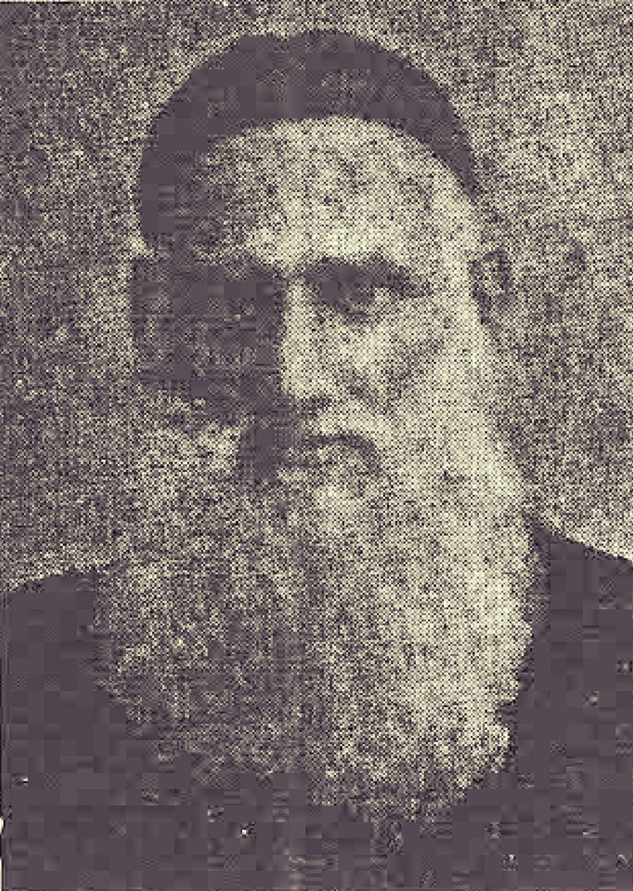 خوري ومؤلف وكاتب